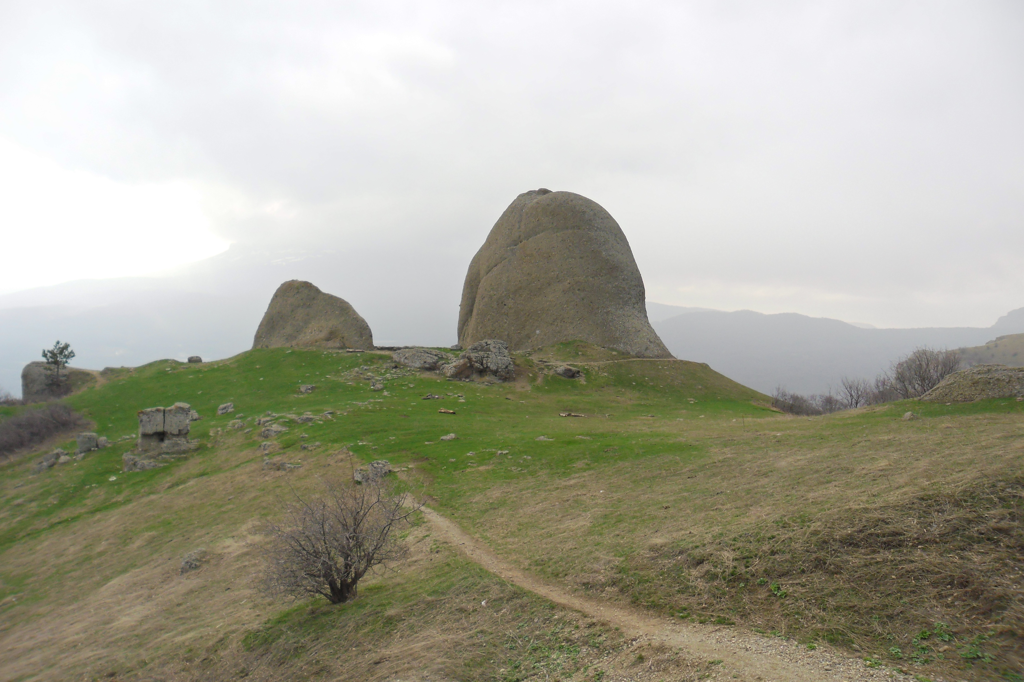 Долина_привидів2: Фото